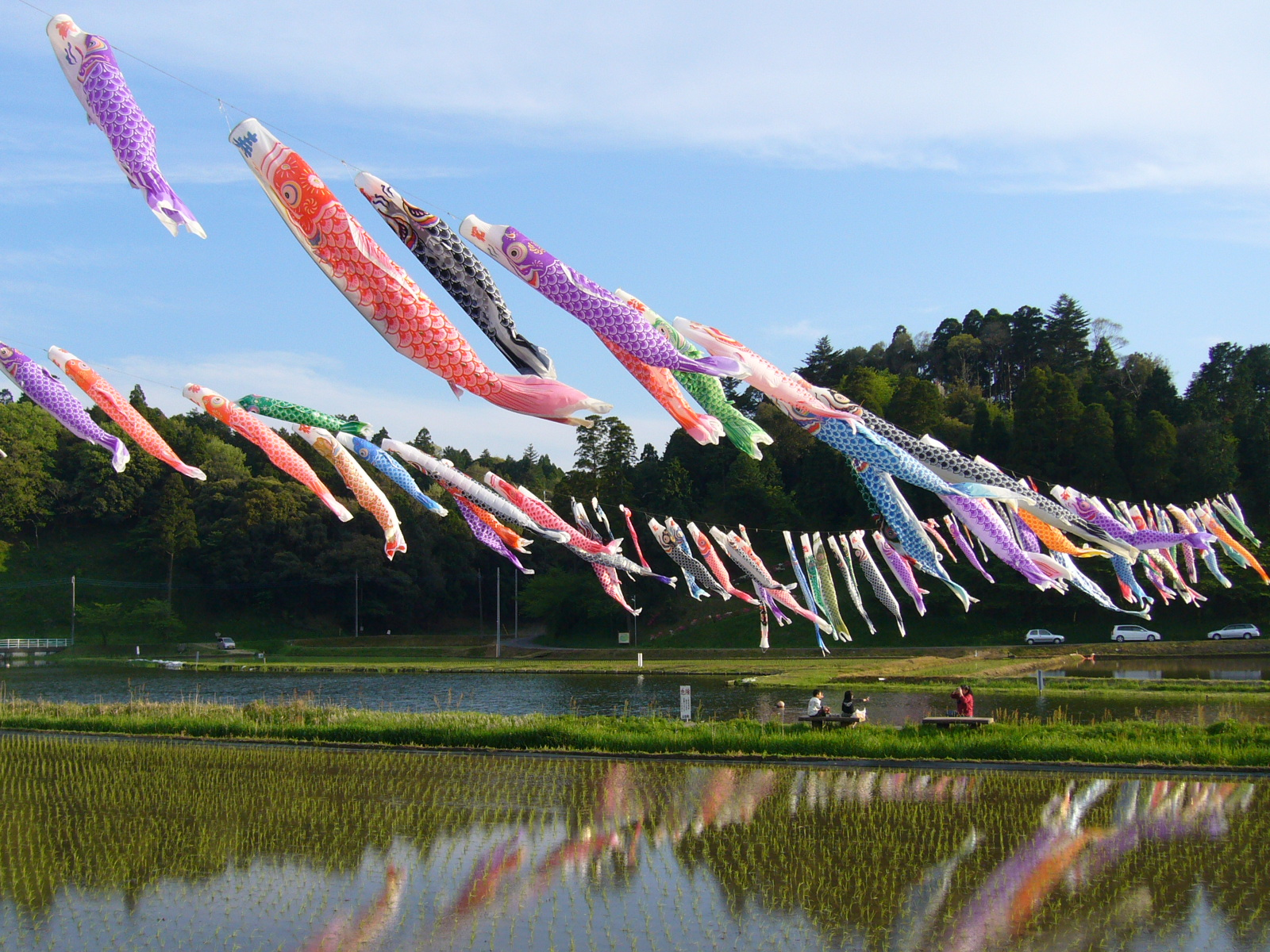 tatibana hureai park2-koinobori,katori-city,japan